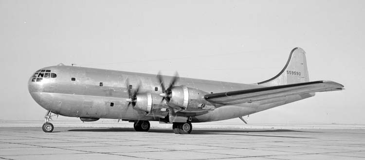 Fairfield-Susuin AAF August 4, 1947.